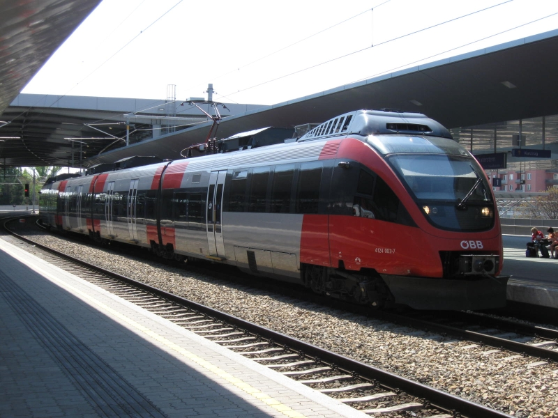 ÖBB Baureihe 4124 - Bombardier Talent 2009 in Wien Praterstern